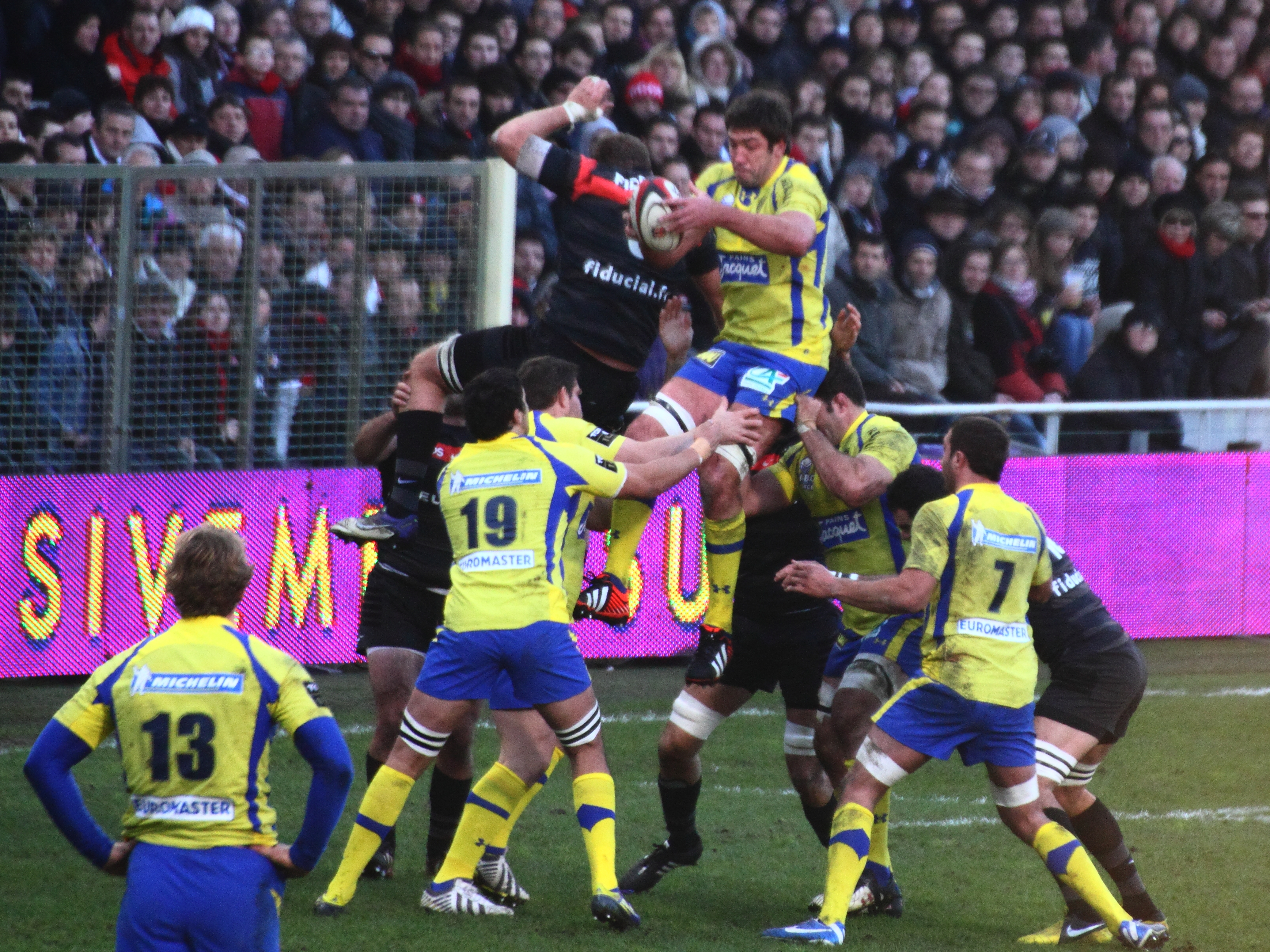 Top 14 2012-2013 — 1 décembre 2012, Stadium de Toulouse. Match between: Stade toulousain — ASM Clermont-Auvergne